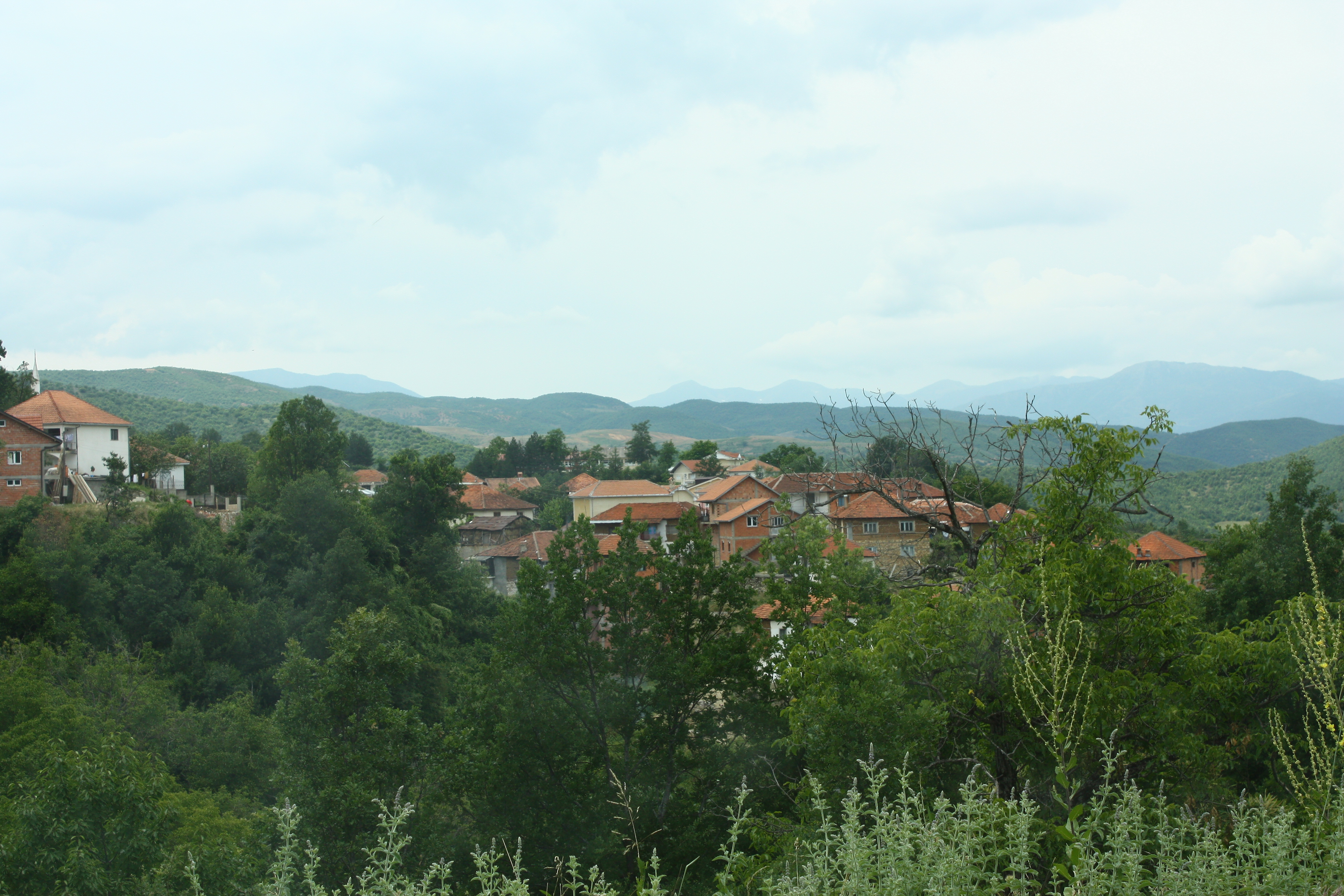 Džepište, Macedonia